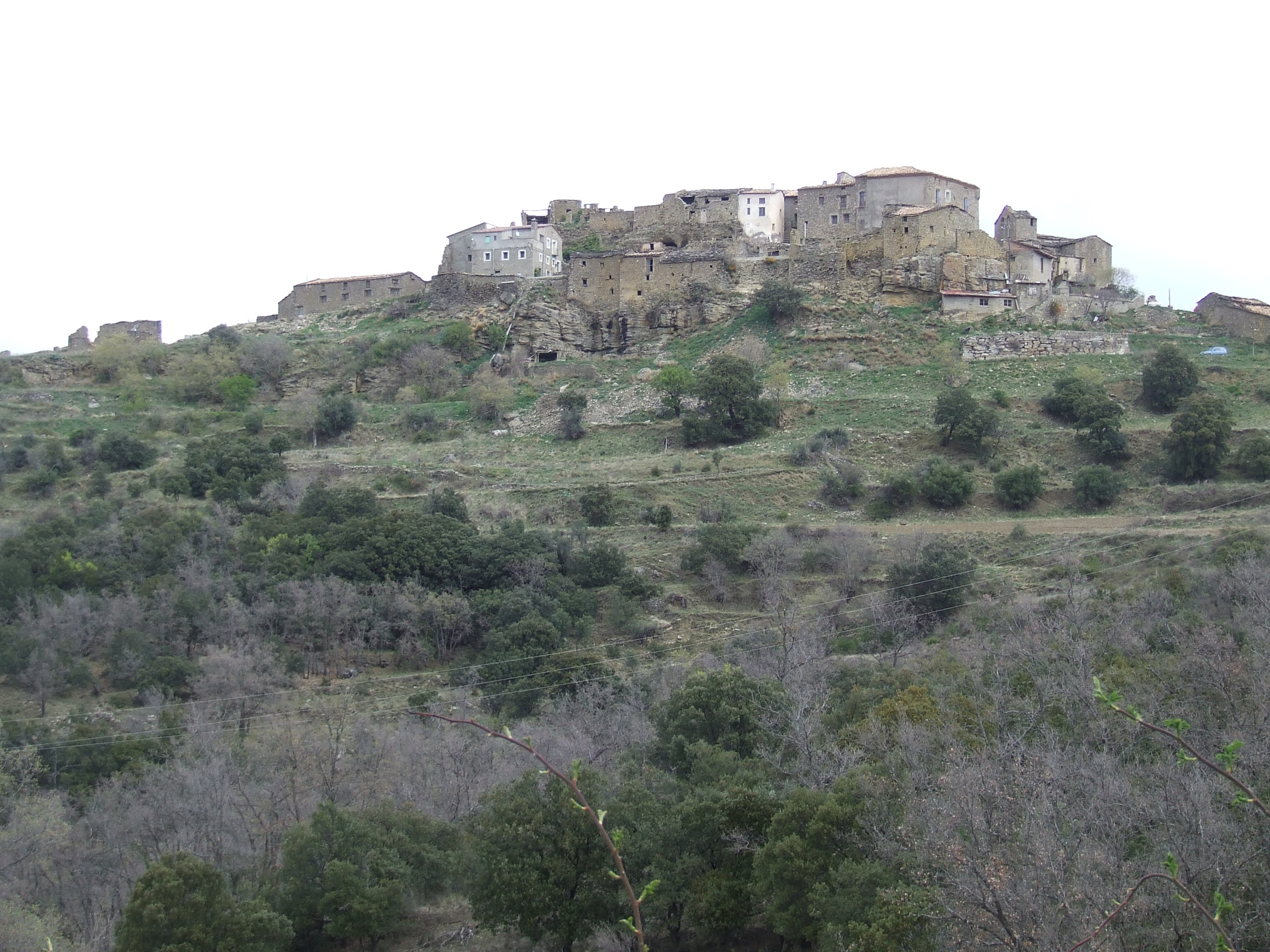 El poble de Castellnou de Montsec dalt del seu turó (Sant Esteve de la Sarga, Pallars Jussà)